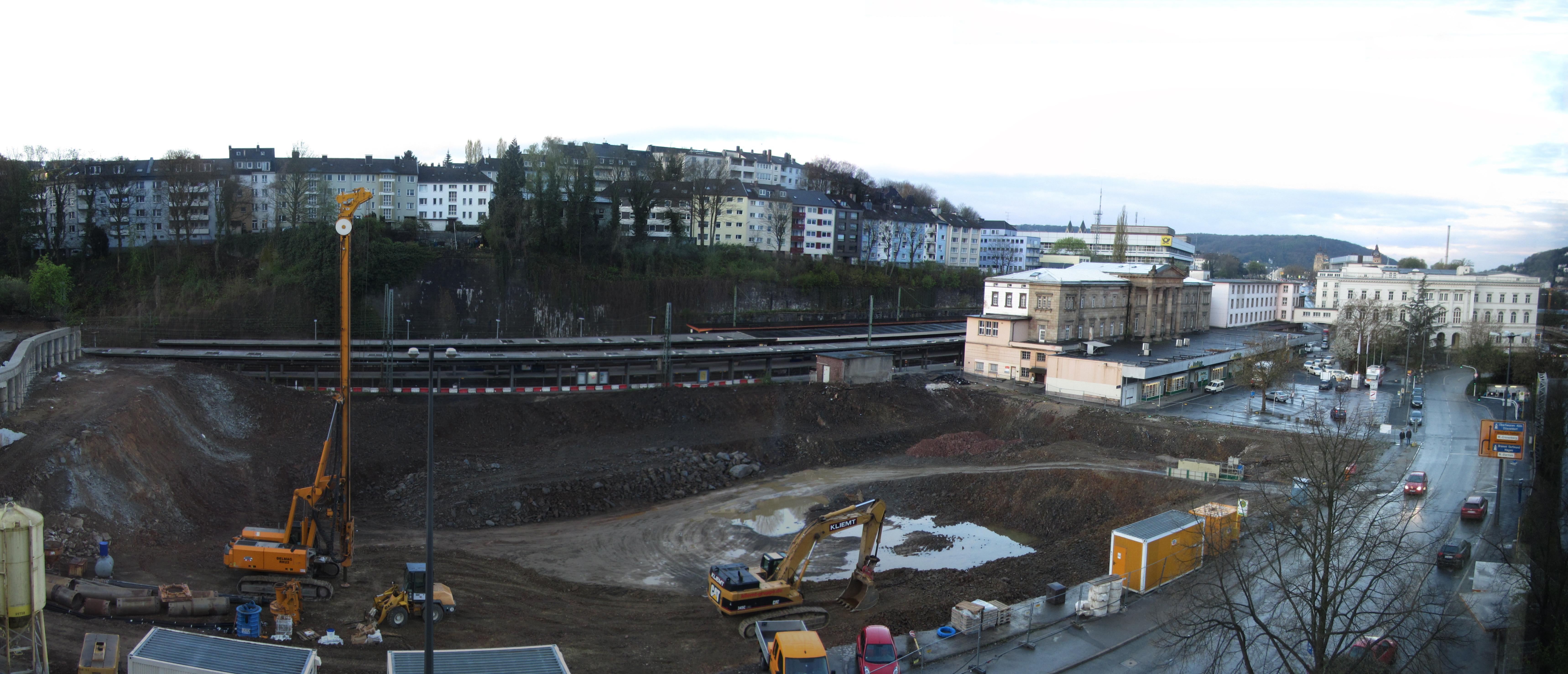 Die Baustelle am Wuppertaler Döppersberg